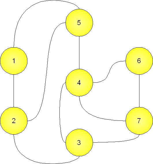 Pfadvektor